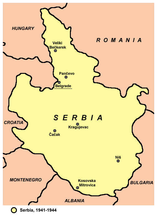 Serbia, 1941-1944. Srbija, 1941-1944.